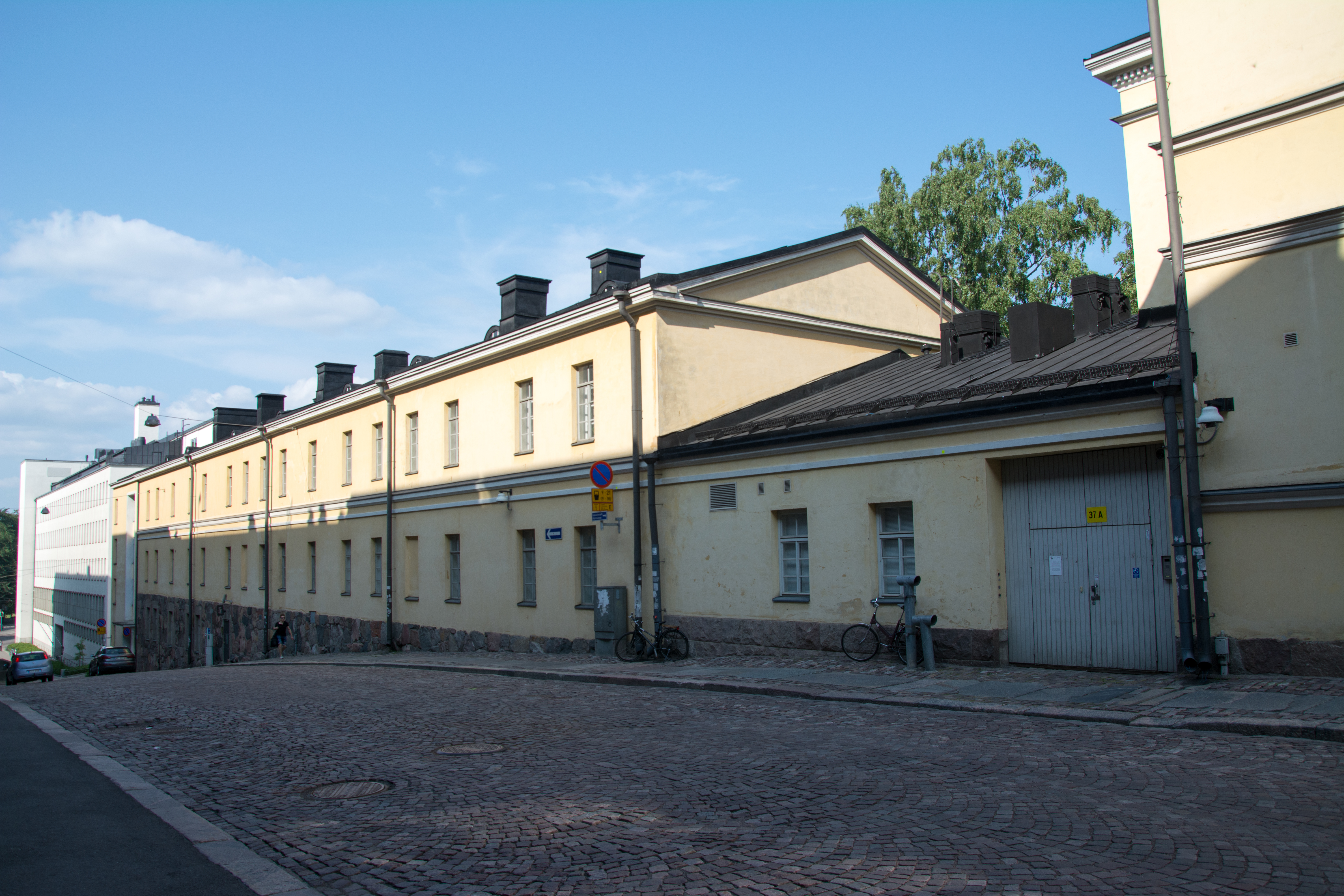 Topelia, Fabianinkatu 37, Helsinki